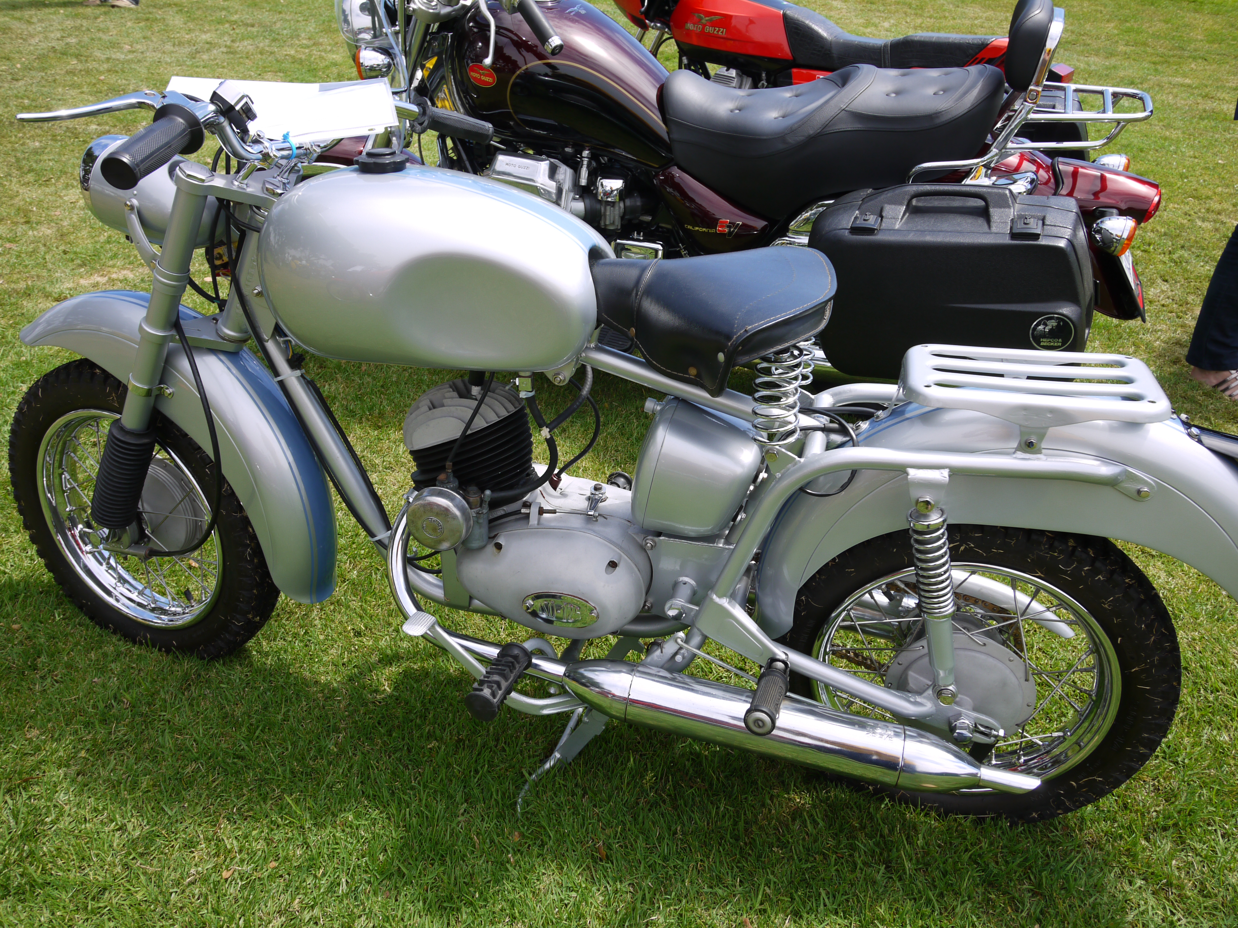 Isomoto 125 B (1954 - 1959), per alcuni mercati esteri "125 GT" (Gransport Touring), versione con cambio a 3 marce del 1956